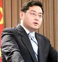 秦刚（1966年3月－）河北人，现為中华人民共和国外交部新闻司副司长，外交部新闻发言人。